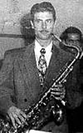 Jazz player Dean Benedetti